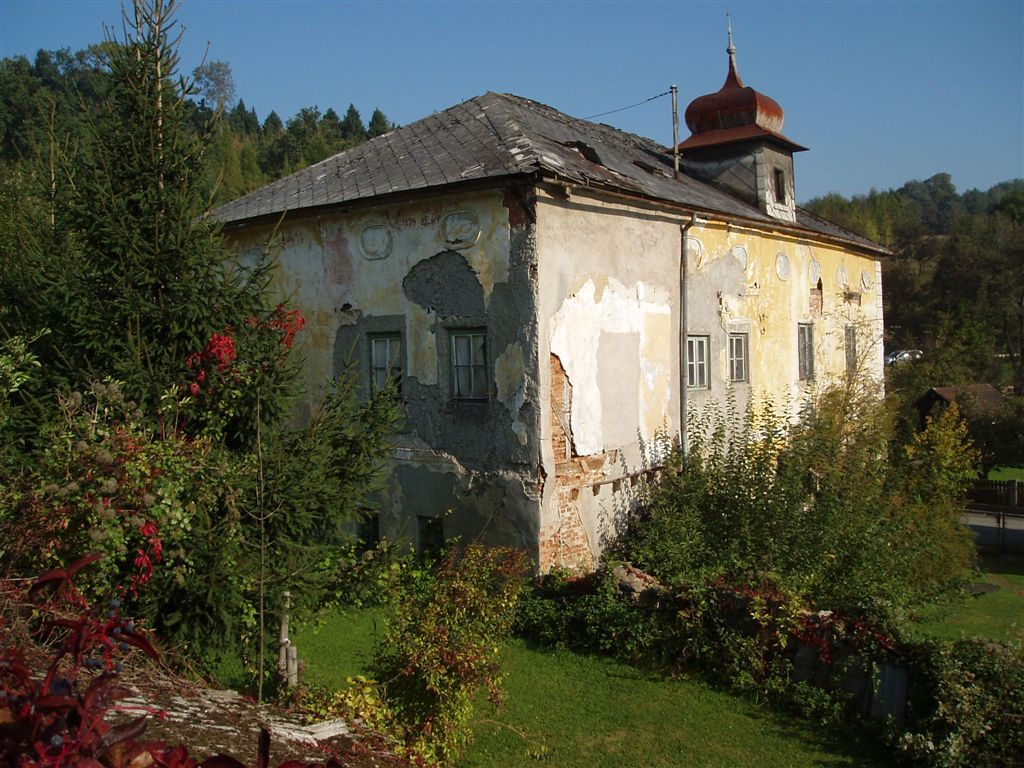 Schloss Bergham neu (Gemeinde Bergham von Leonding)